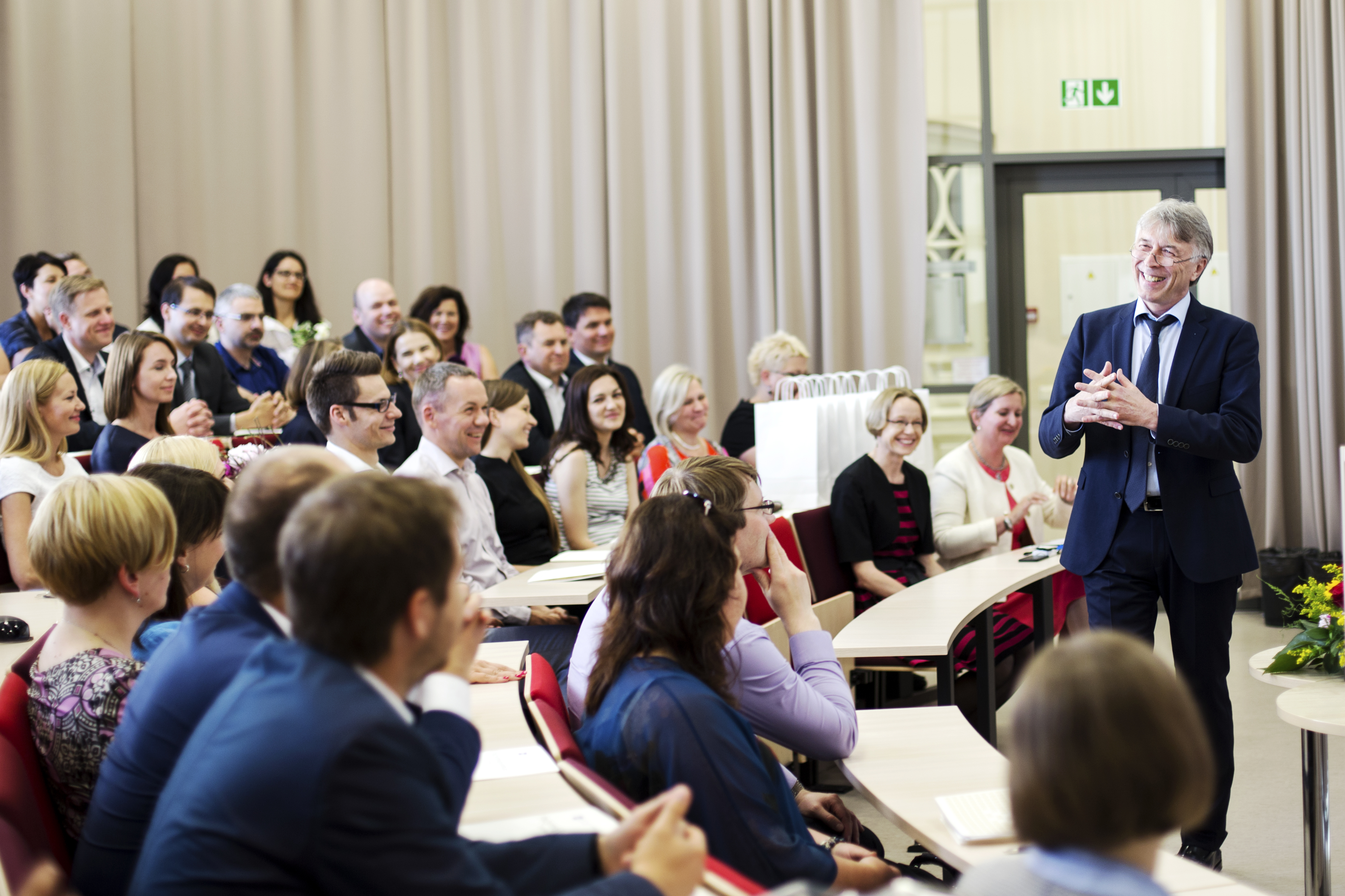 ISM Vadybos ir ekonomikos universitetas siūlo puikias mokymosi sąlygas - modernią biblioteką, turinčią didžiausią naujausių verslo knygų fondą ir prieigą prie svarbiausių duomenų bazių. Naujai rekonstruoti pastatai, erdvios, šiuolaikiškai įrengtos auditorijos, kompiuterių klasės.